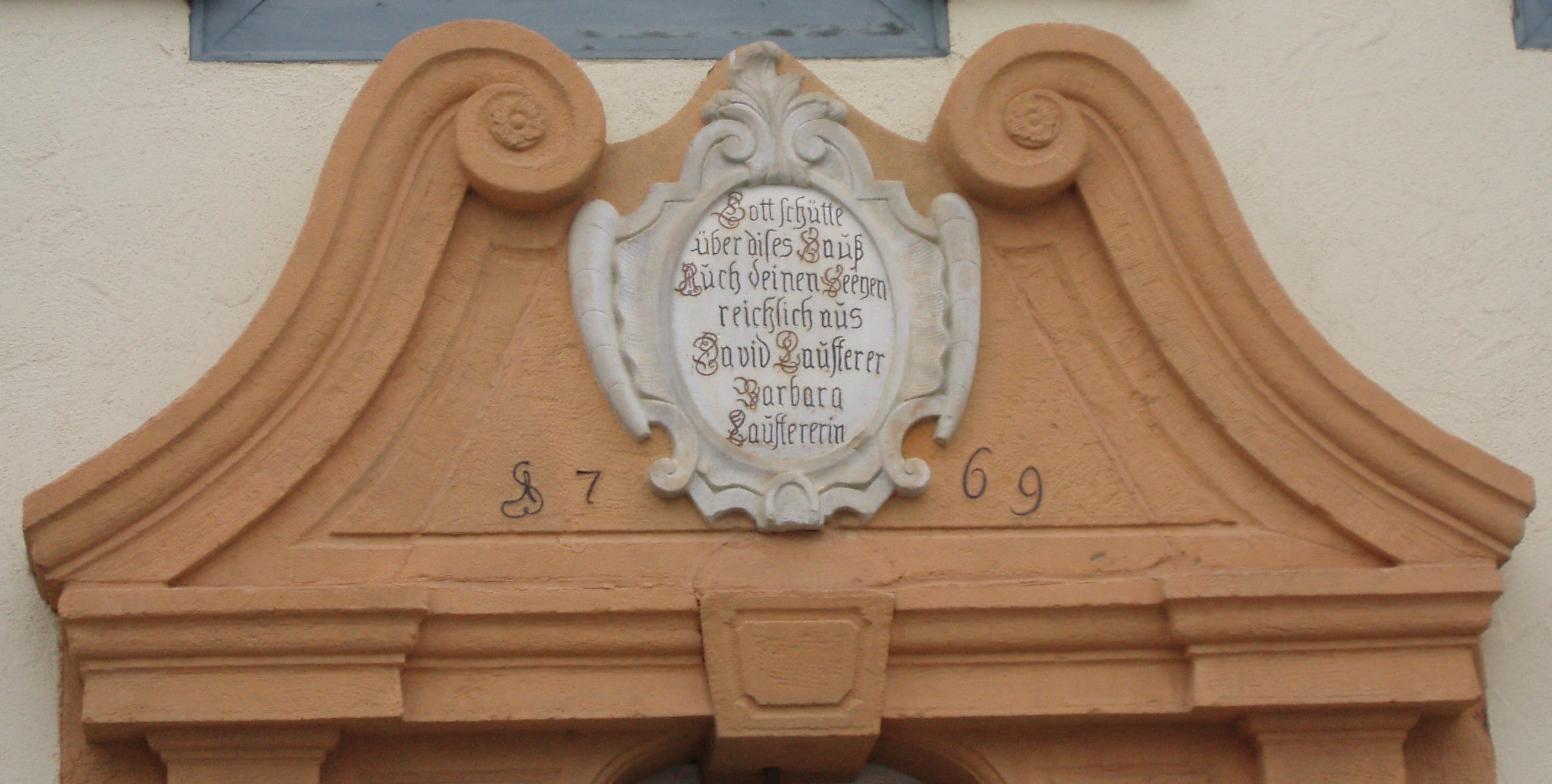 Ziergiebel mit Inschrift über dem Eingang des Ochsen in Stetten